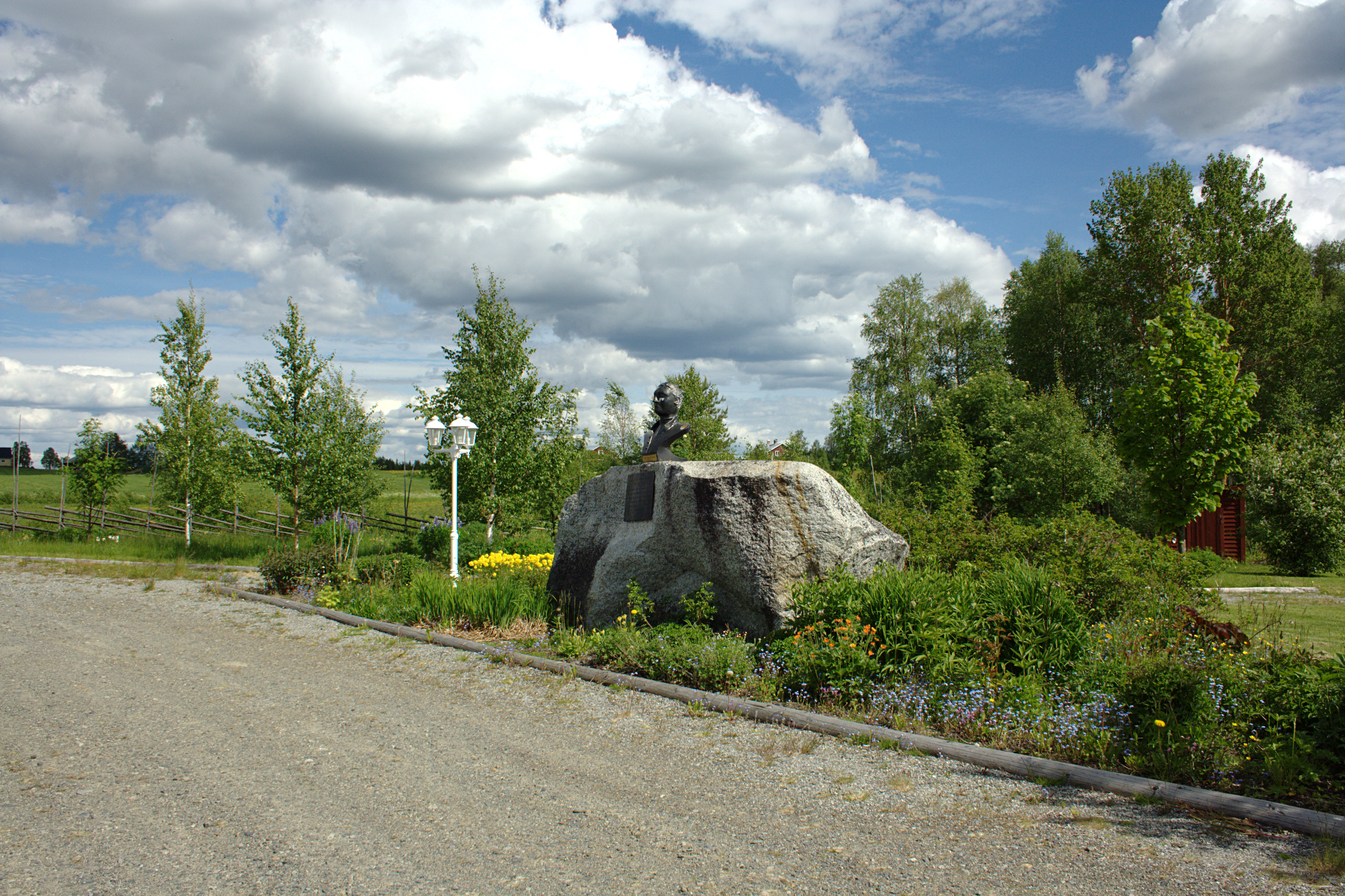 Linnéparken i Gunnarn. En park vid Vintertjärn med bland annat en del växter som har särskild anknytning till Linné. Parken invigdes 2007.